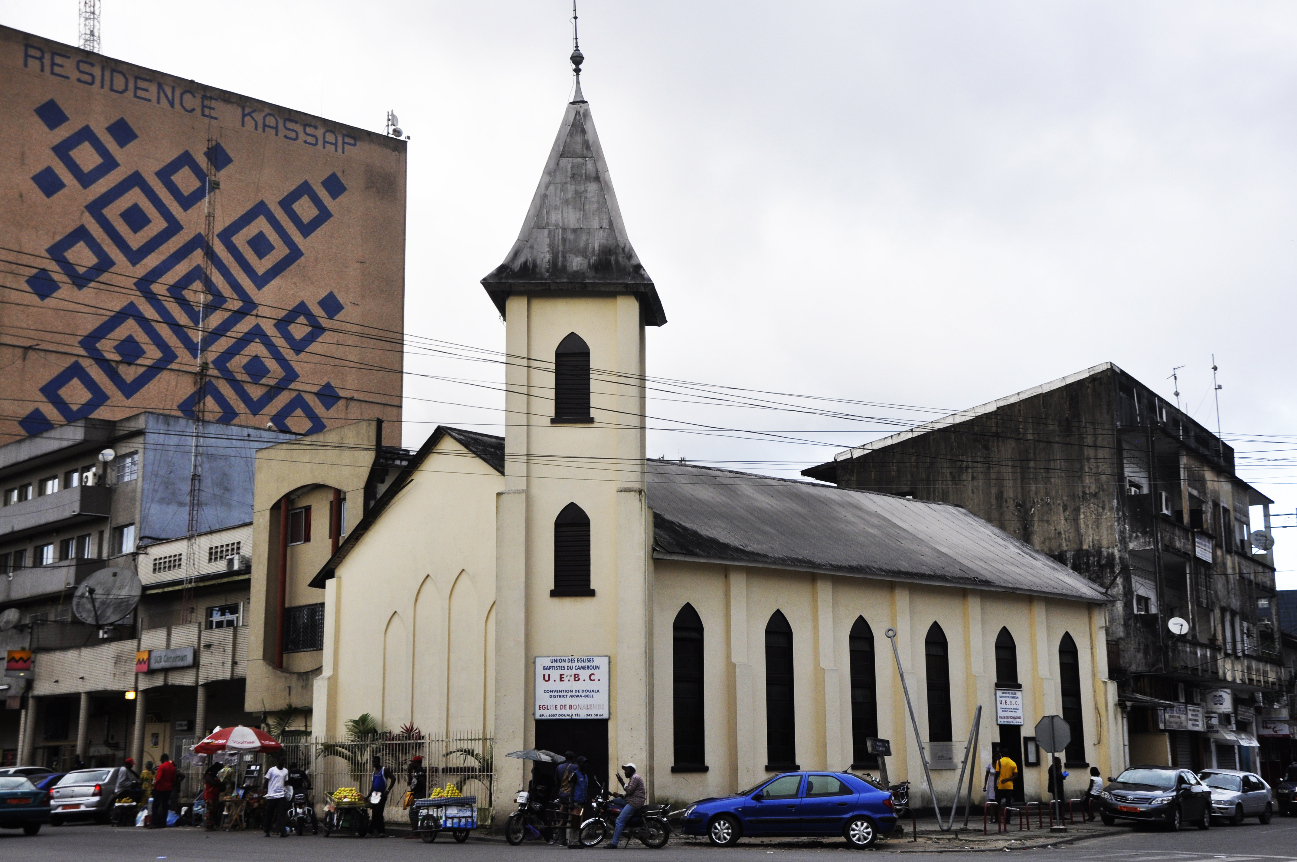 Temple de Bonalembe